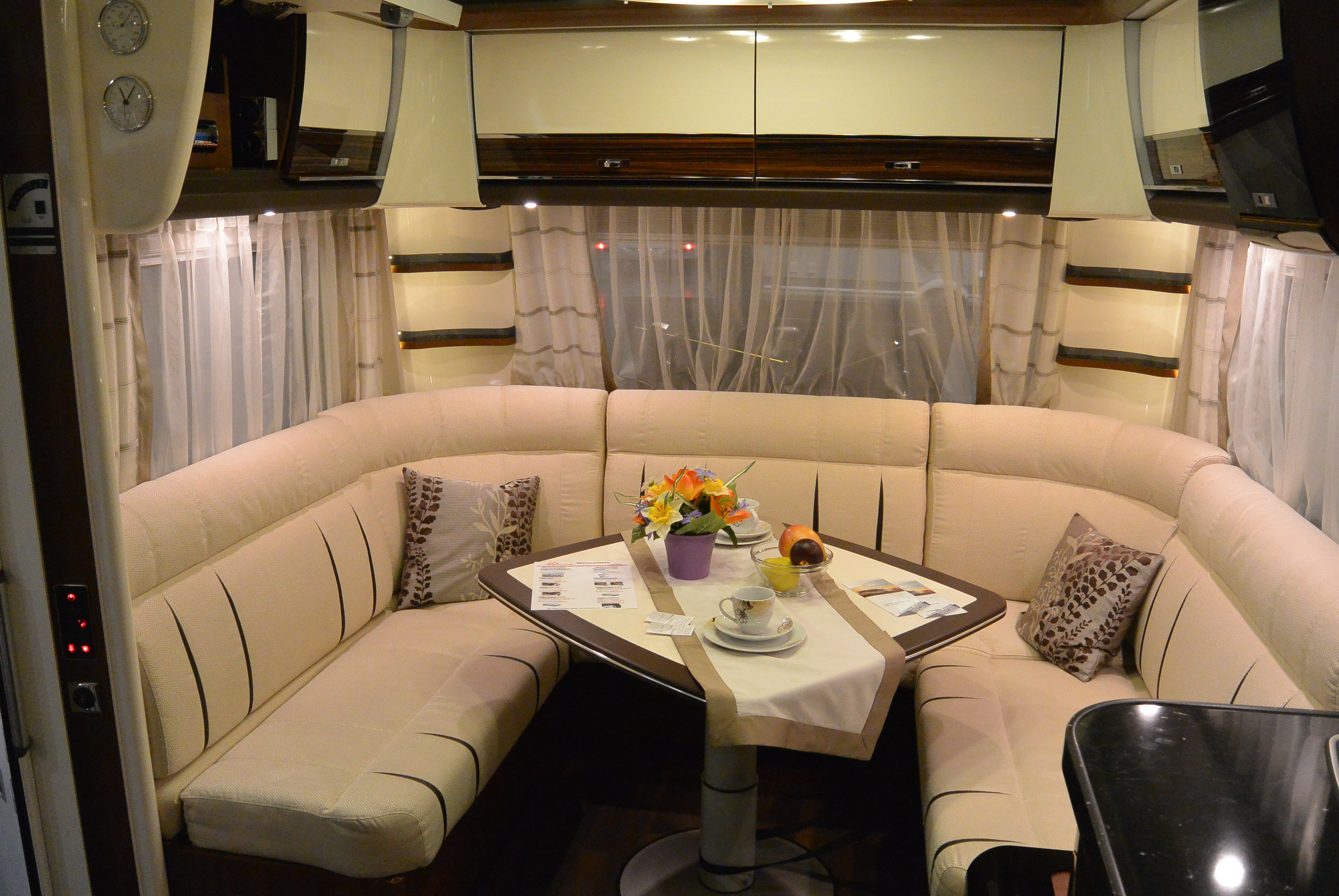 Wnętrze przyczepy kempingowej Tabbert Grande Puccini 655DF podczas Motor Show Poznań 2014.